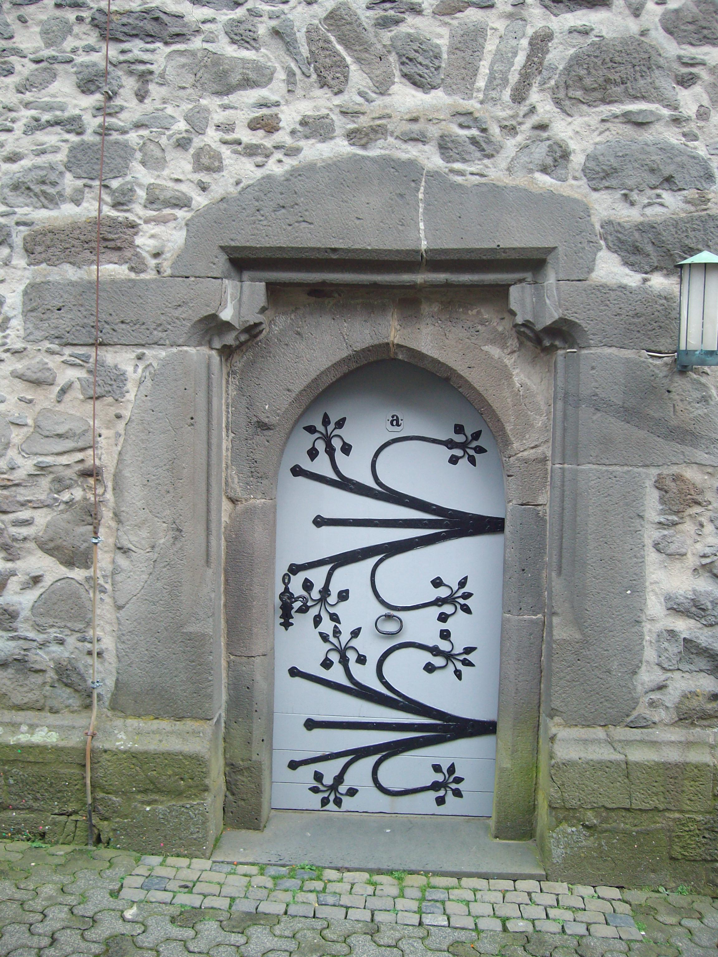 Evangelische Kirche Buseck-Beuern, Hessen, Deutschland